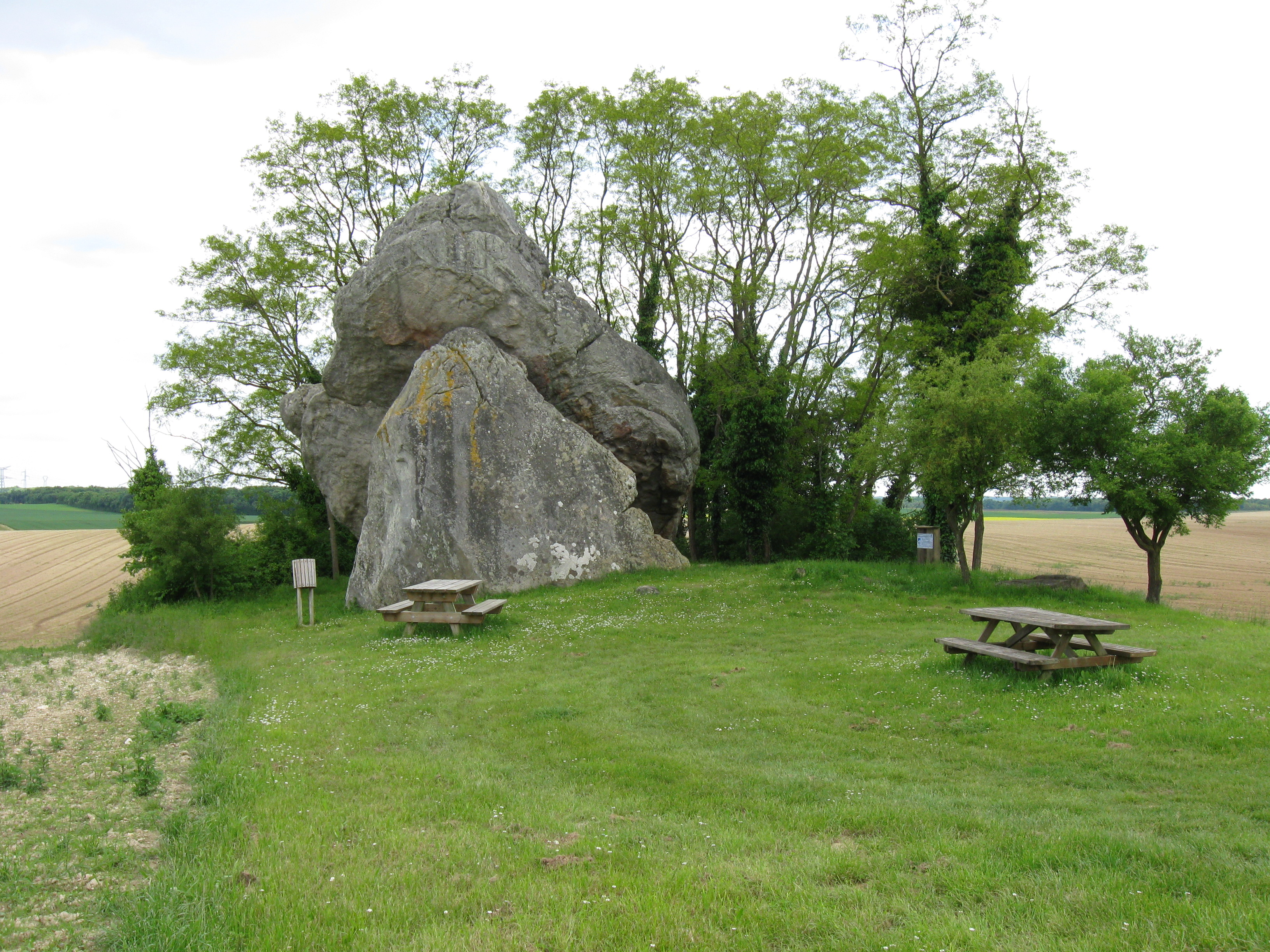 La Roche du Saut, le long de la départementale 22. (Villecerf, Seine-et-Marne, région Île-de-France).